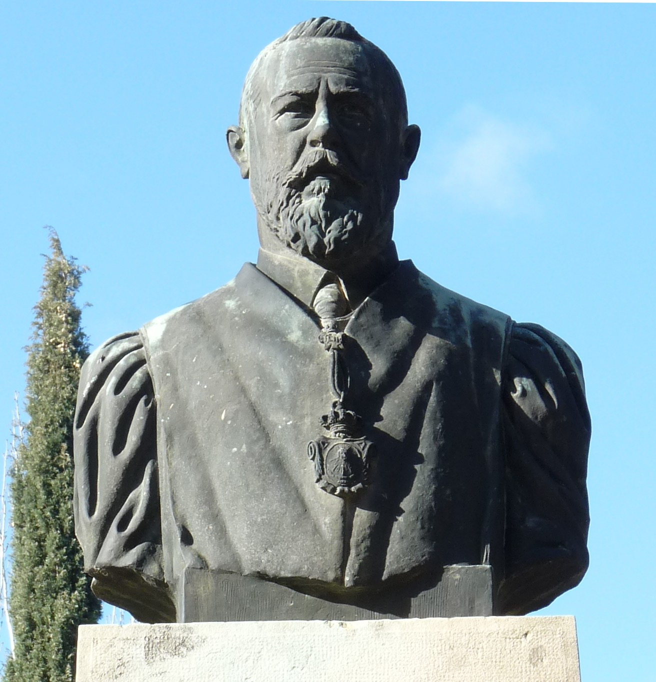 Zaragoza - Monumento a Félix Cerrada y Martín (alcalde de Zaragoza) en el Parque Grande; realizado por Pascual Salaverri en 1929